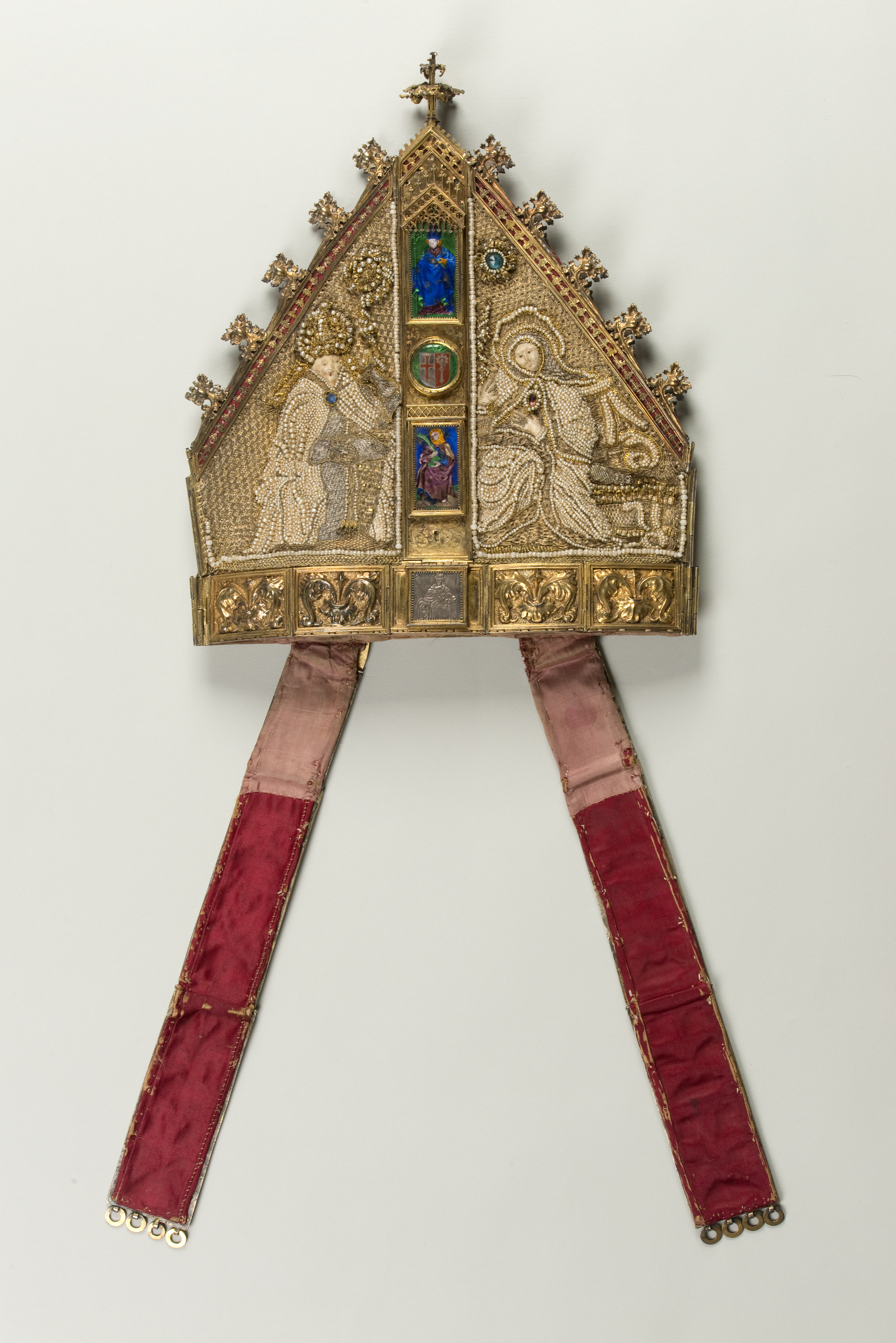 Die Frauenfelder Mitra ist im Historischen Museum Thurgau im Schloss Frauenfeld ausgestellt.